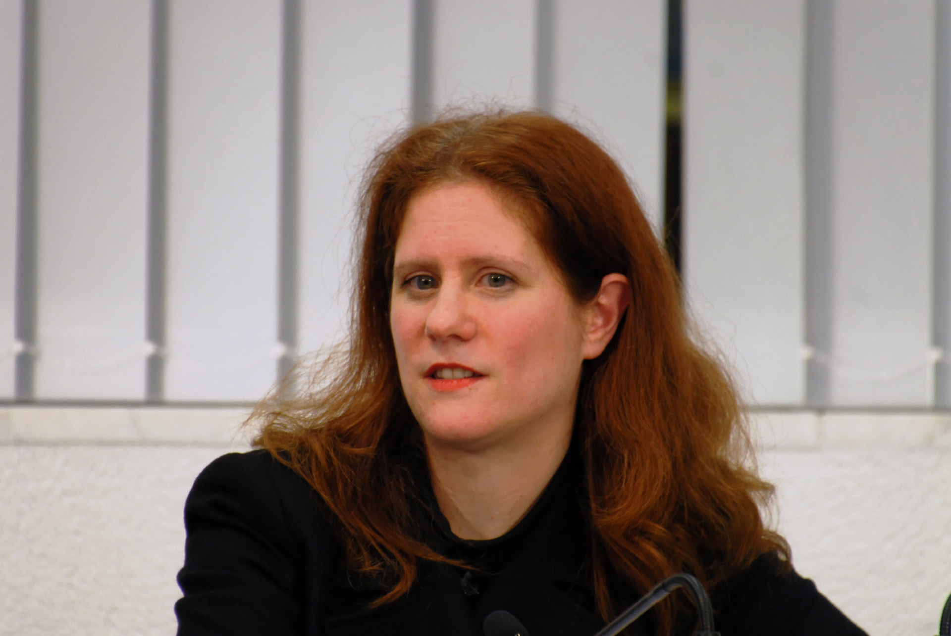 Irene Kurka in der Zentralbibliothek in Düsseldorf